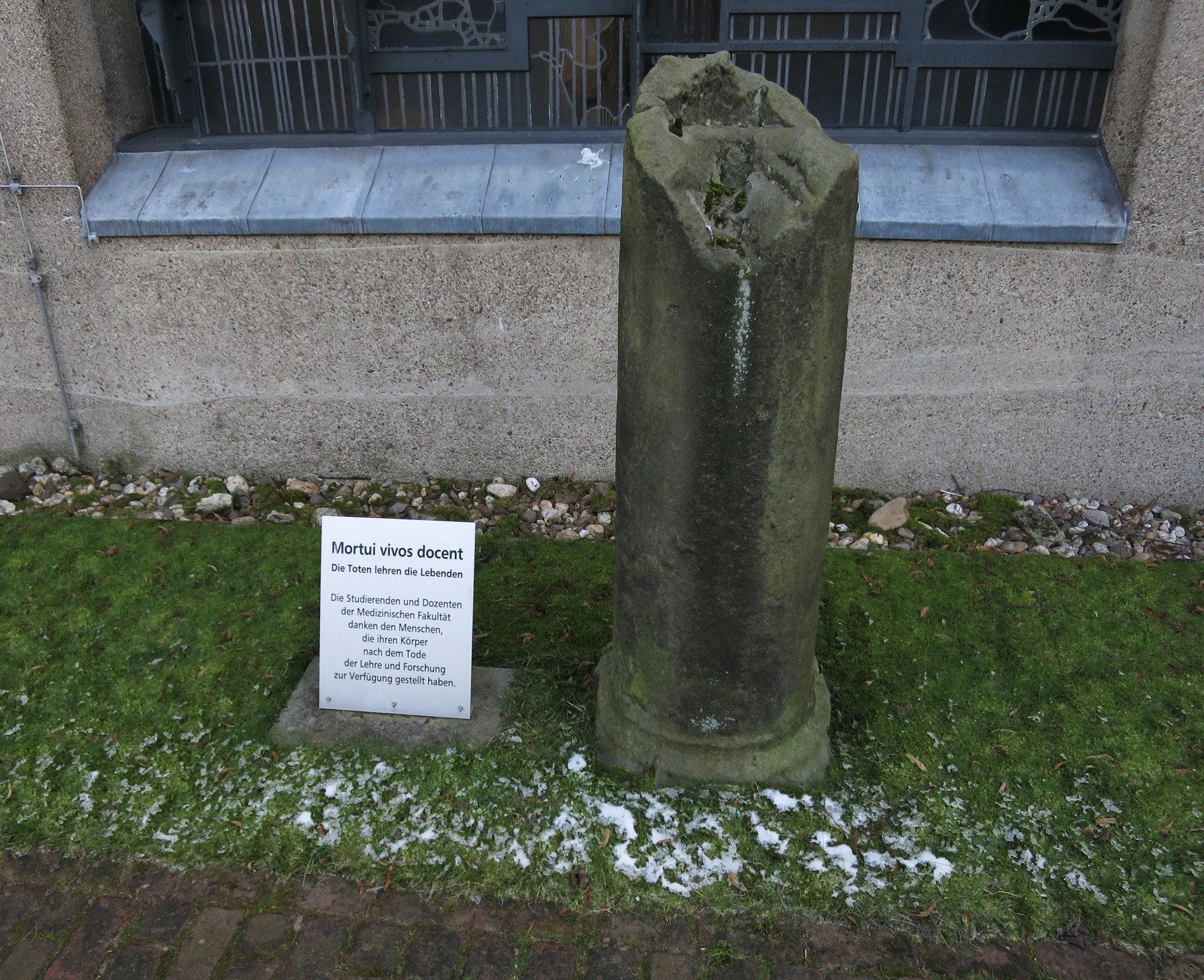 Gedenksäule an Körperspender der Medizinischen Fakultät der Universität Köln - Klinikkirche St. Johannes der Täufer, Joseph-Stelzmann-Straße